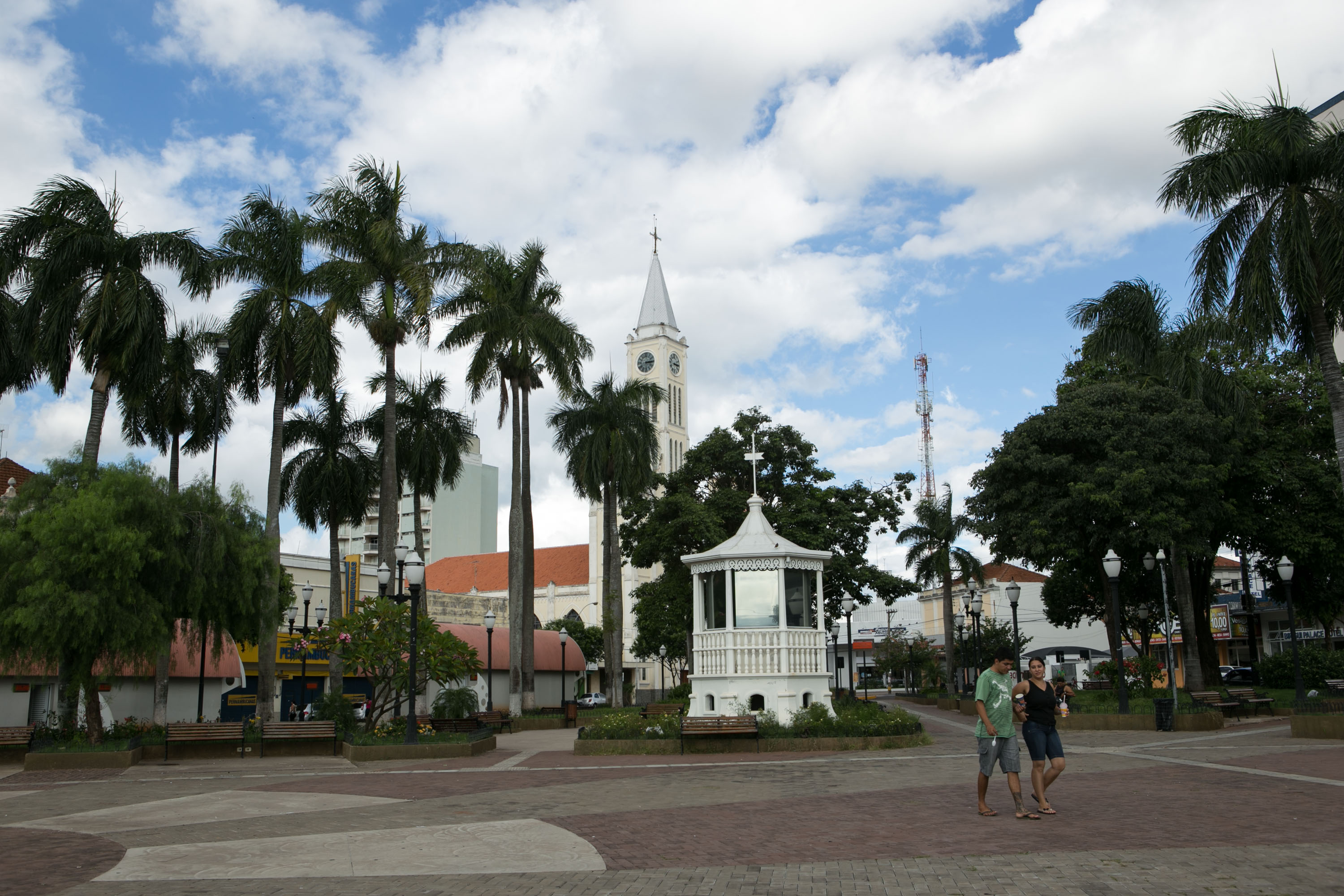 Praça Dr. Gama, marco central da cidade de Birigui, no interior do estado de São Paulo.